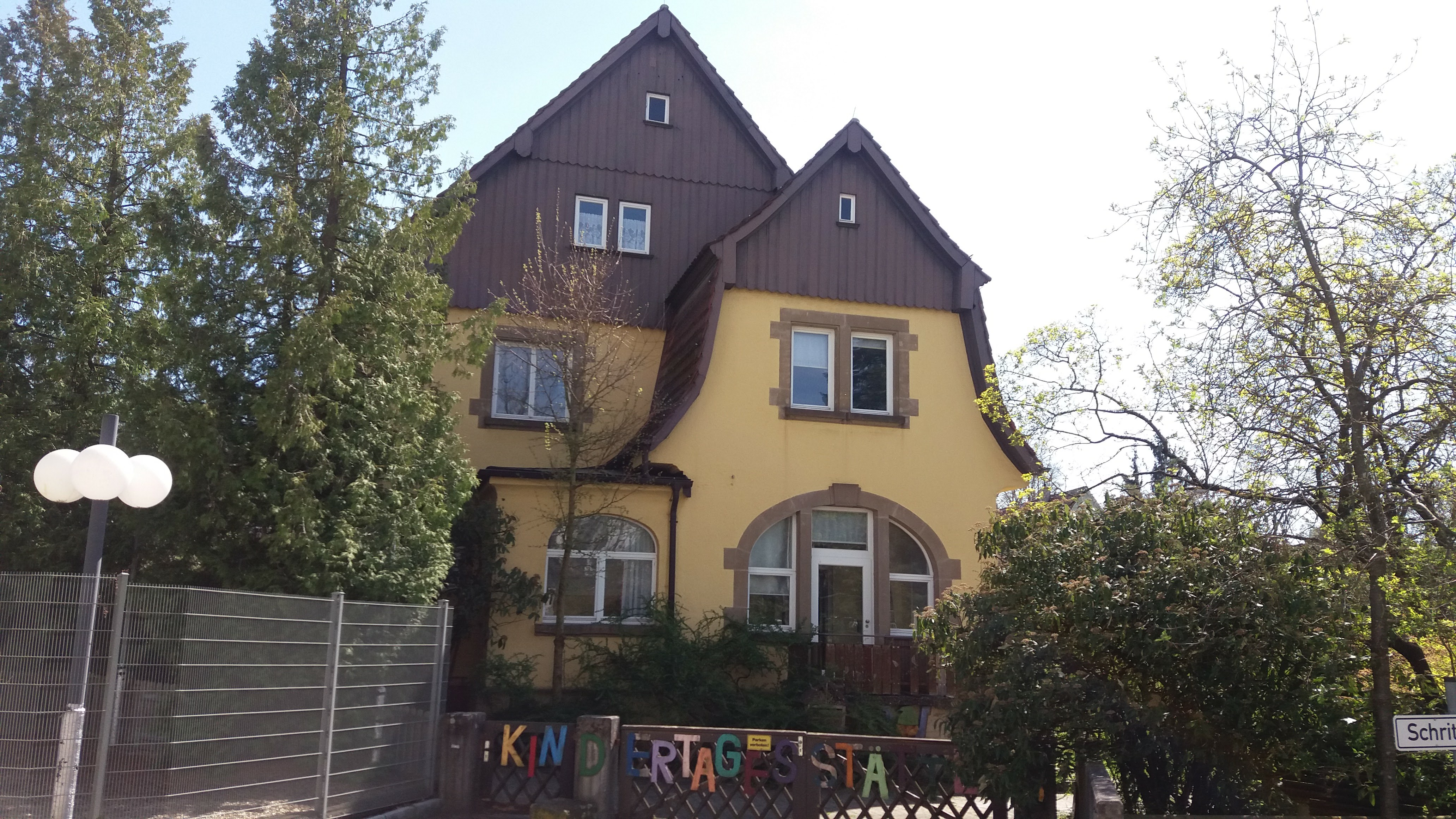 Die ehem. Villa Peregrina Crailsheimer Straße 35 7453 Schwäbisch Hall